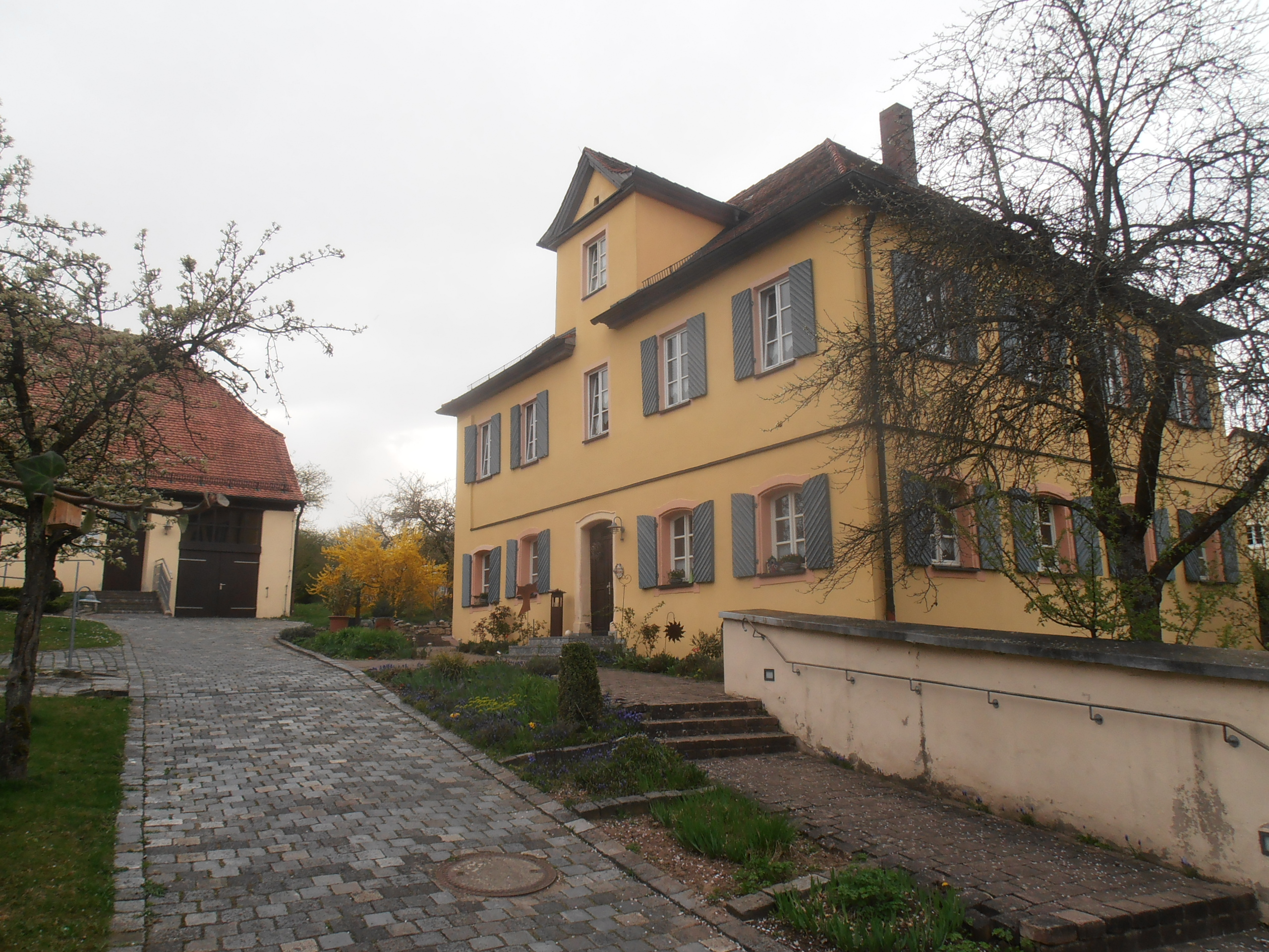 Ehem. katholische Pfarrhof in Offenbau, zweigeschossiger, verputzter Massivbau mit Walmdach, 1. Hälfte 19. Jahrhundert